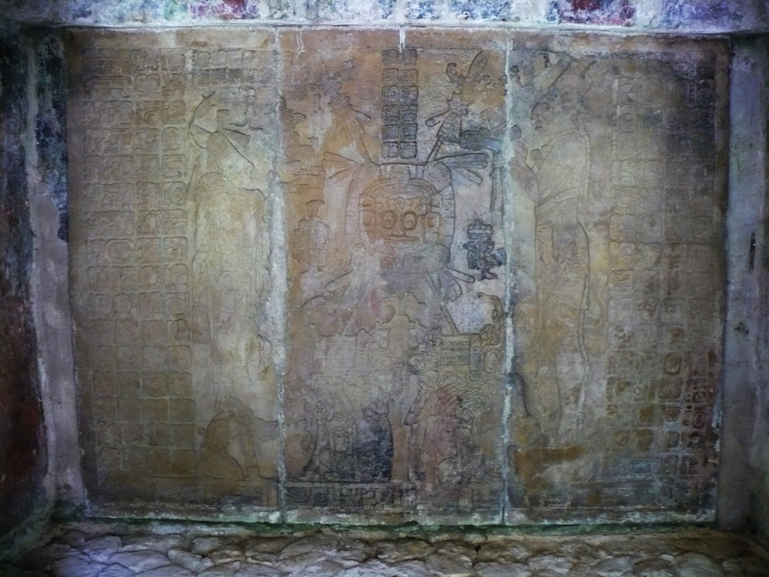 Palenque